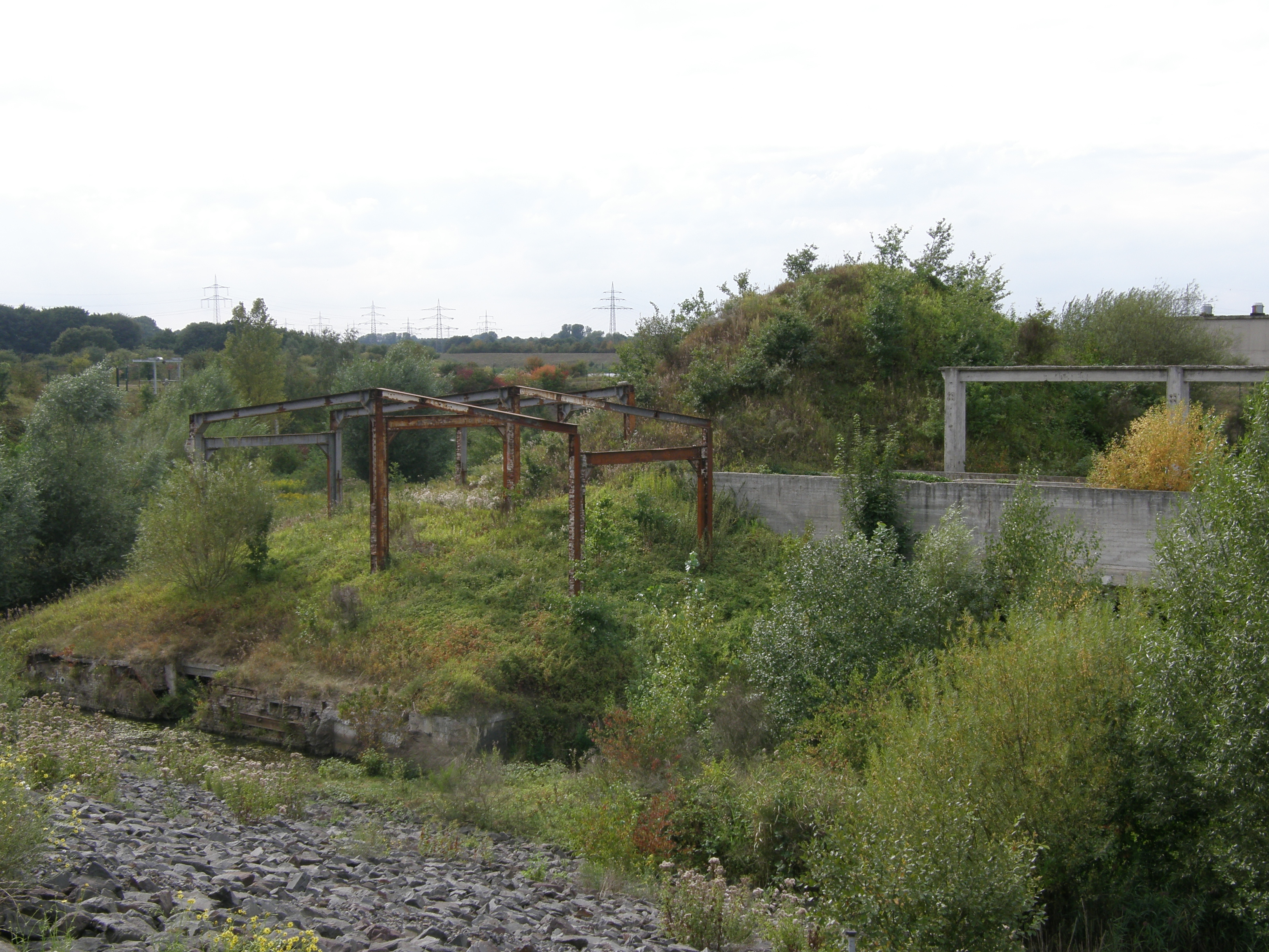 Ehemaliges Wasserwerk des Chemieparks Marl in Sickingmühle, umgestaltet von Herman Prigann zu einem Landschaftsbauwerk. Aufgeschütteter Hügel und Reste der Bebauung.